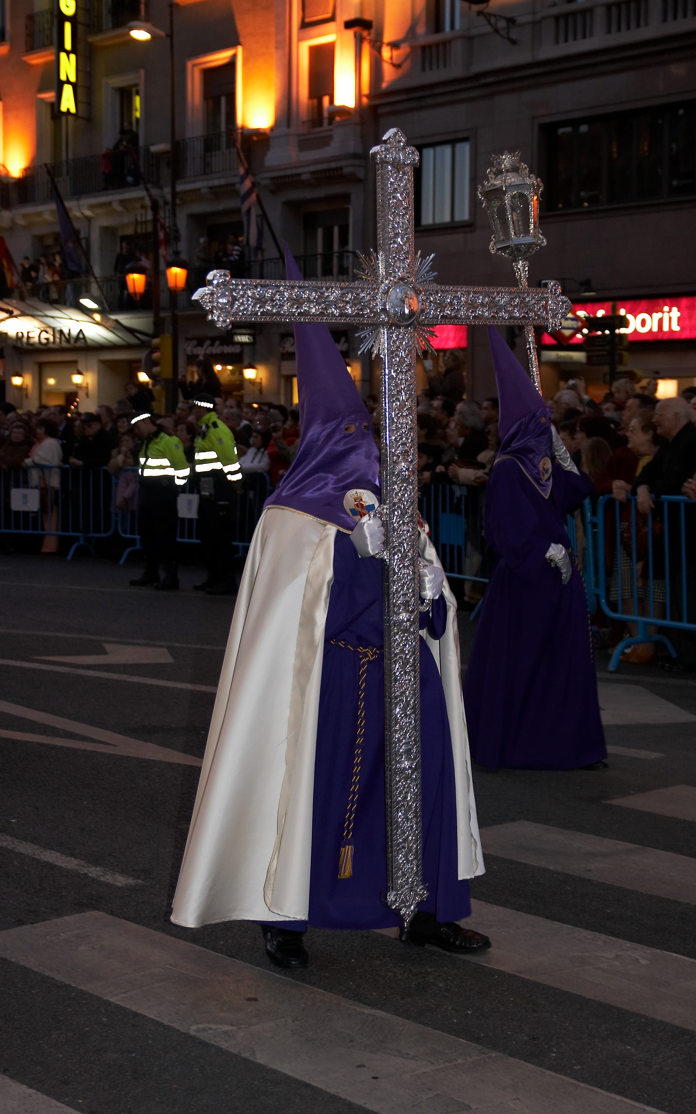 Procesión Jesús Nazareno de Medinaceli, Madrid.